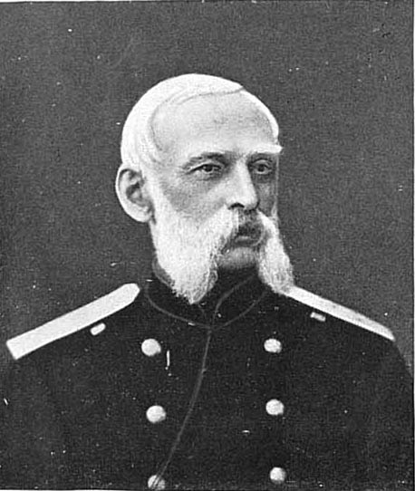 генерал Паукер, Герман Егорович